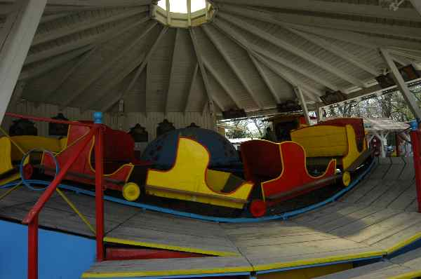 Böhmischer Prater in Favoriten - Ringelspiel Raupe